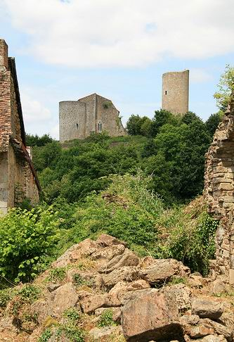 Château de Châlus Chabrol vu par Renaud Camus